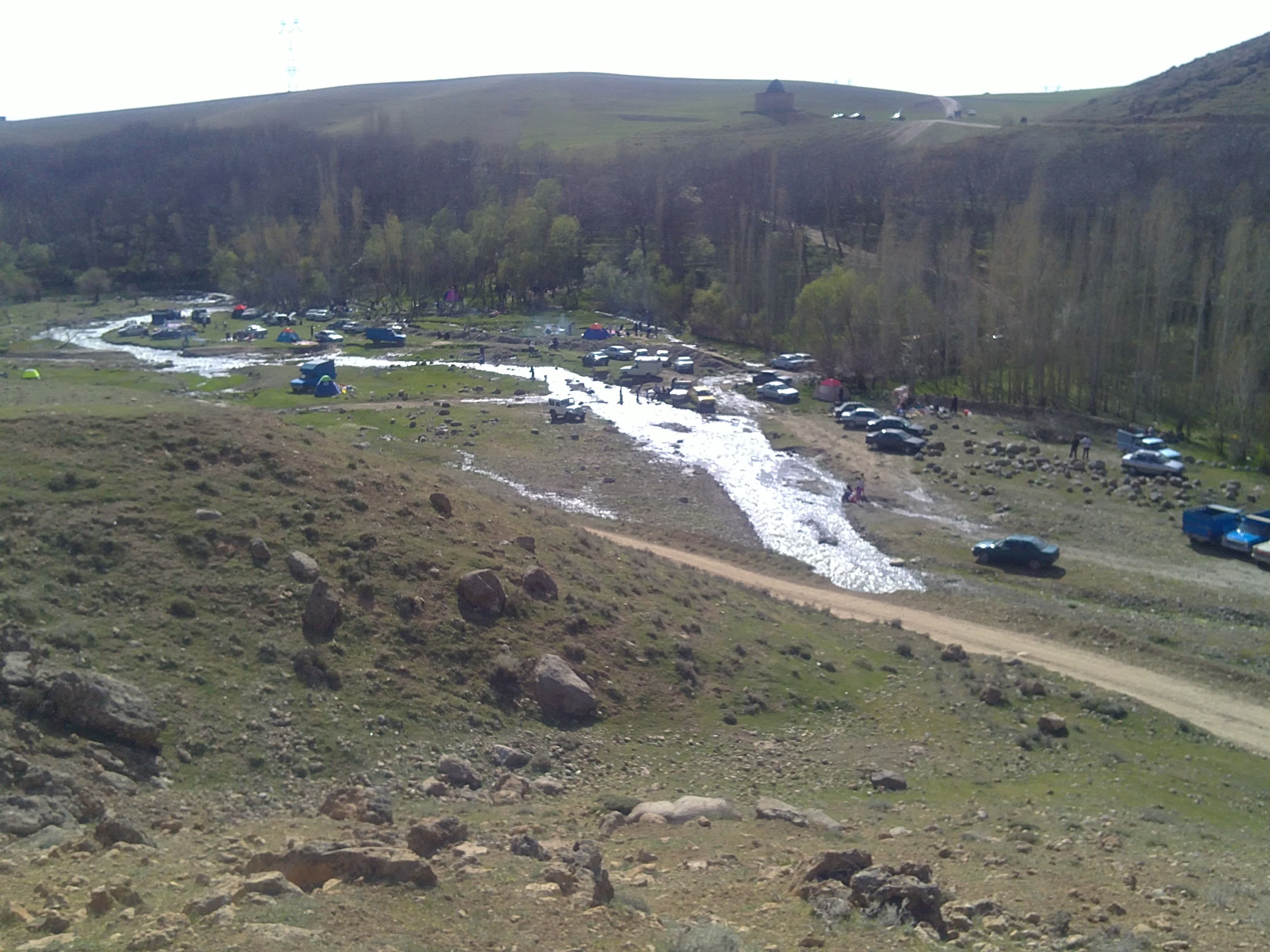 منطقه چنار در روستای آهق